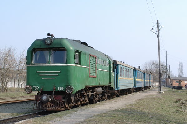 ТУ2-066 (TU2-066) in Saritschne